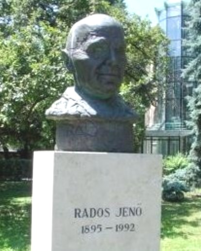 Rados Jenő bronz büszt a BME kertjében. Szathmáry Gyöngyi alkotása (2000)